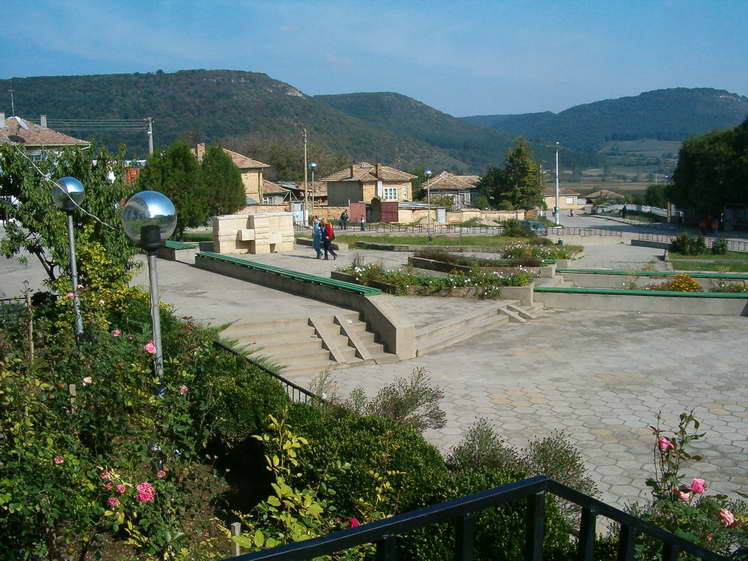 Централният площад на село Крепча, Опаченско